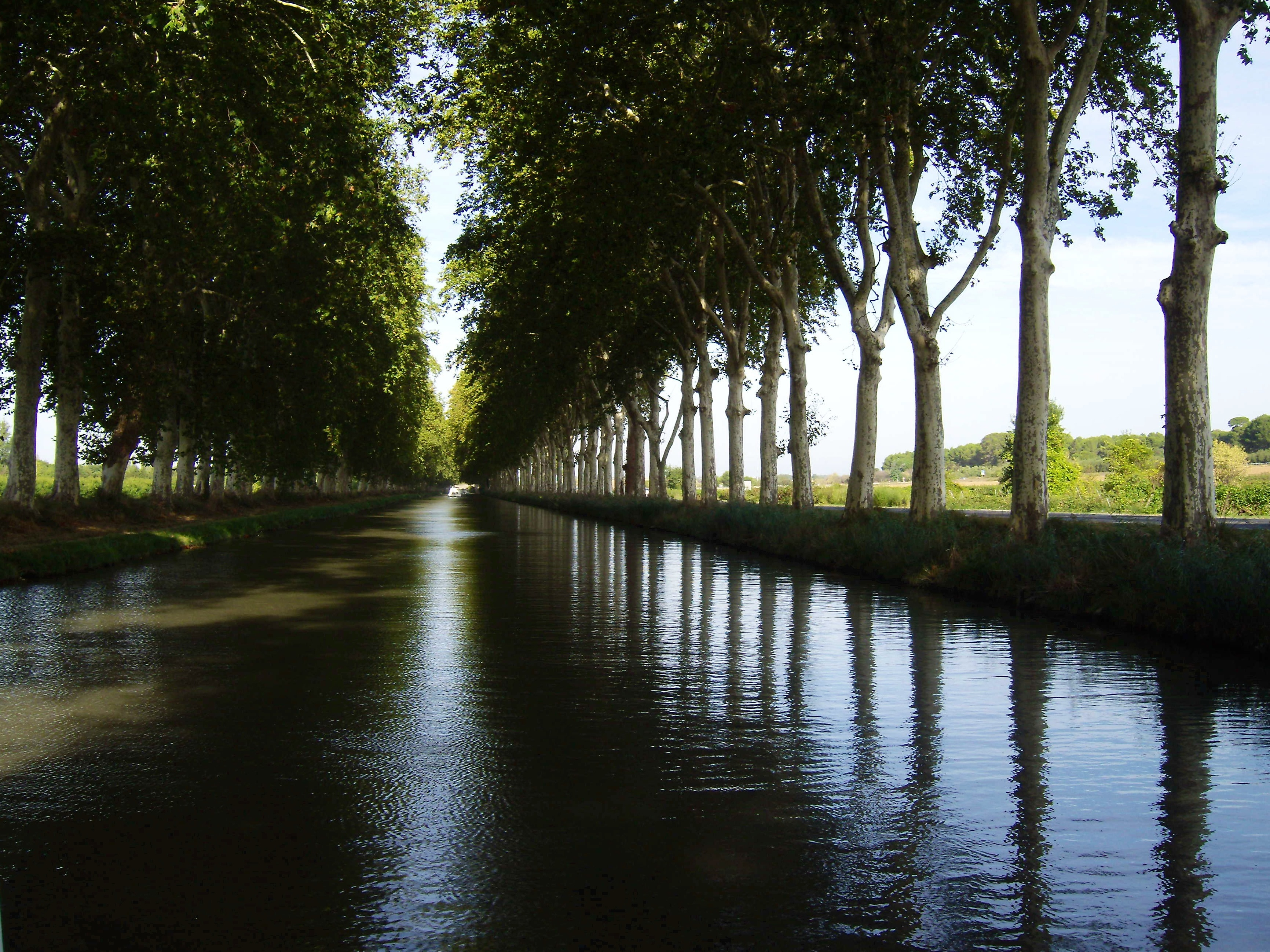 Route fluviale du Sud-Ouest, France